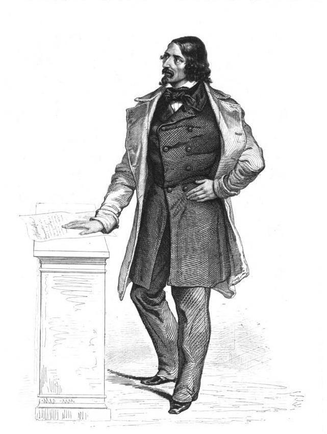 "Ch. Lagrange"